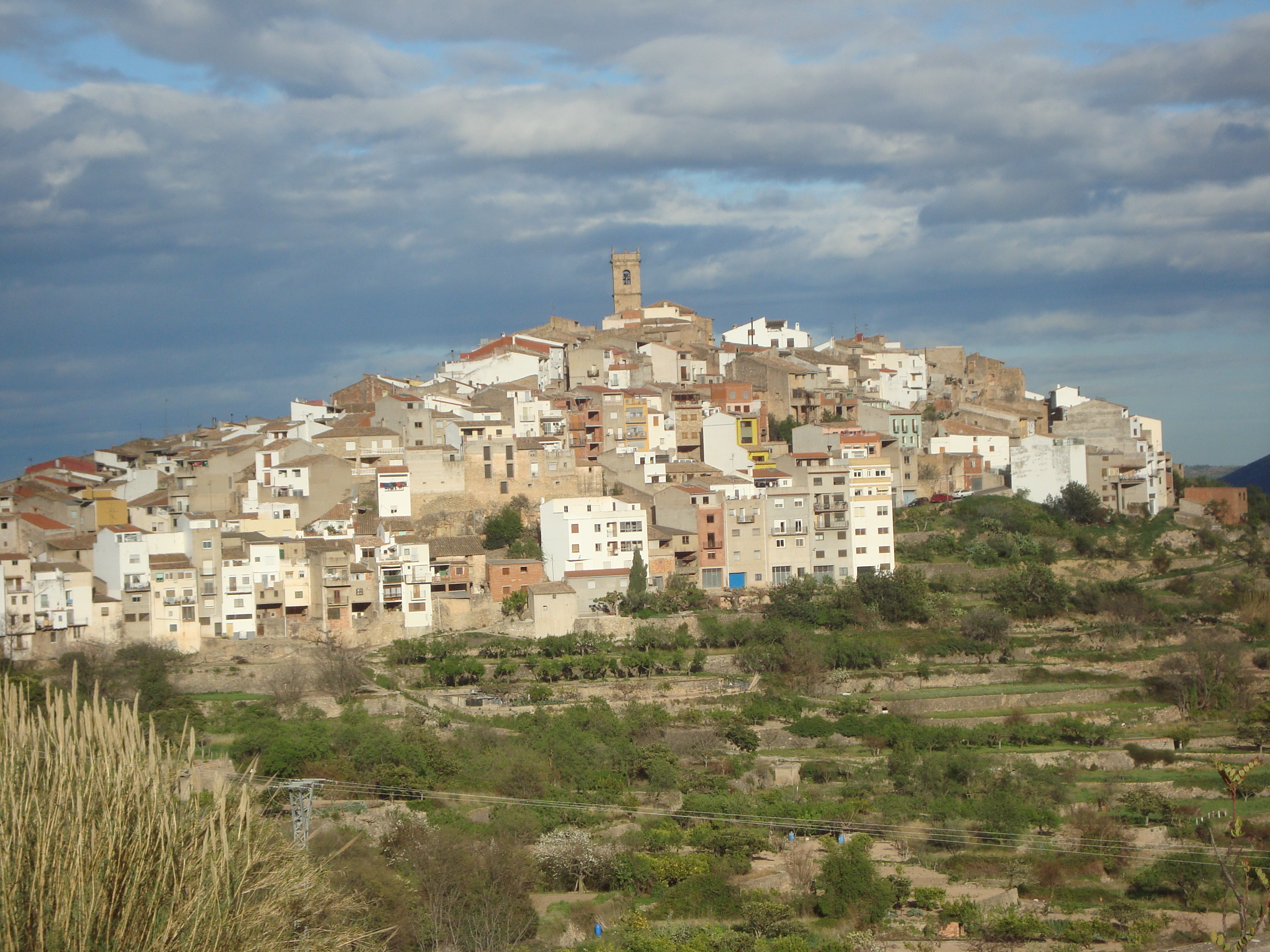 Vista panorámica de Les Useres (Castellón)